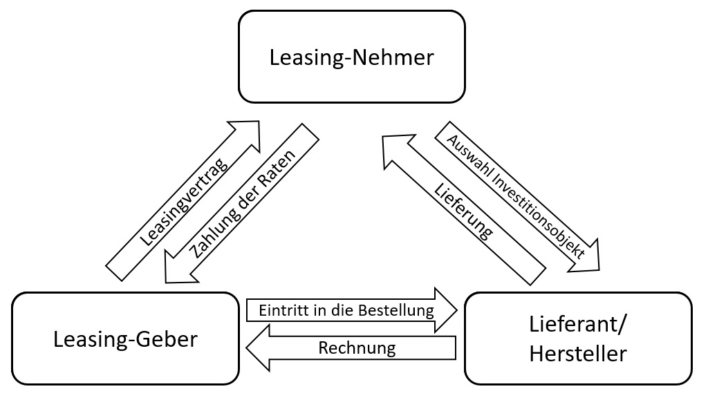 Schema Leasing